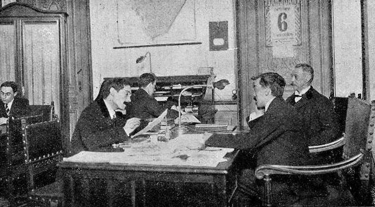 Redacción de Correo de Galicia de Buenos Aires, fotografía en Vida Gallega 1910 De esquerda a dereita: Rivas, Romaguera, Paredes Rey e José R. Lence